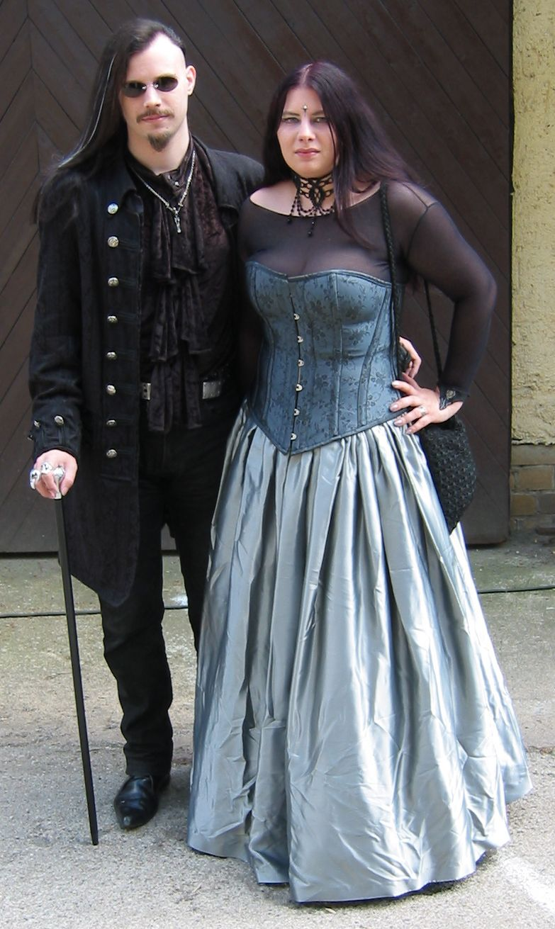 Aufgenommen auf dem Wave-Gotik-Treffen 2004 zu Leipzig.